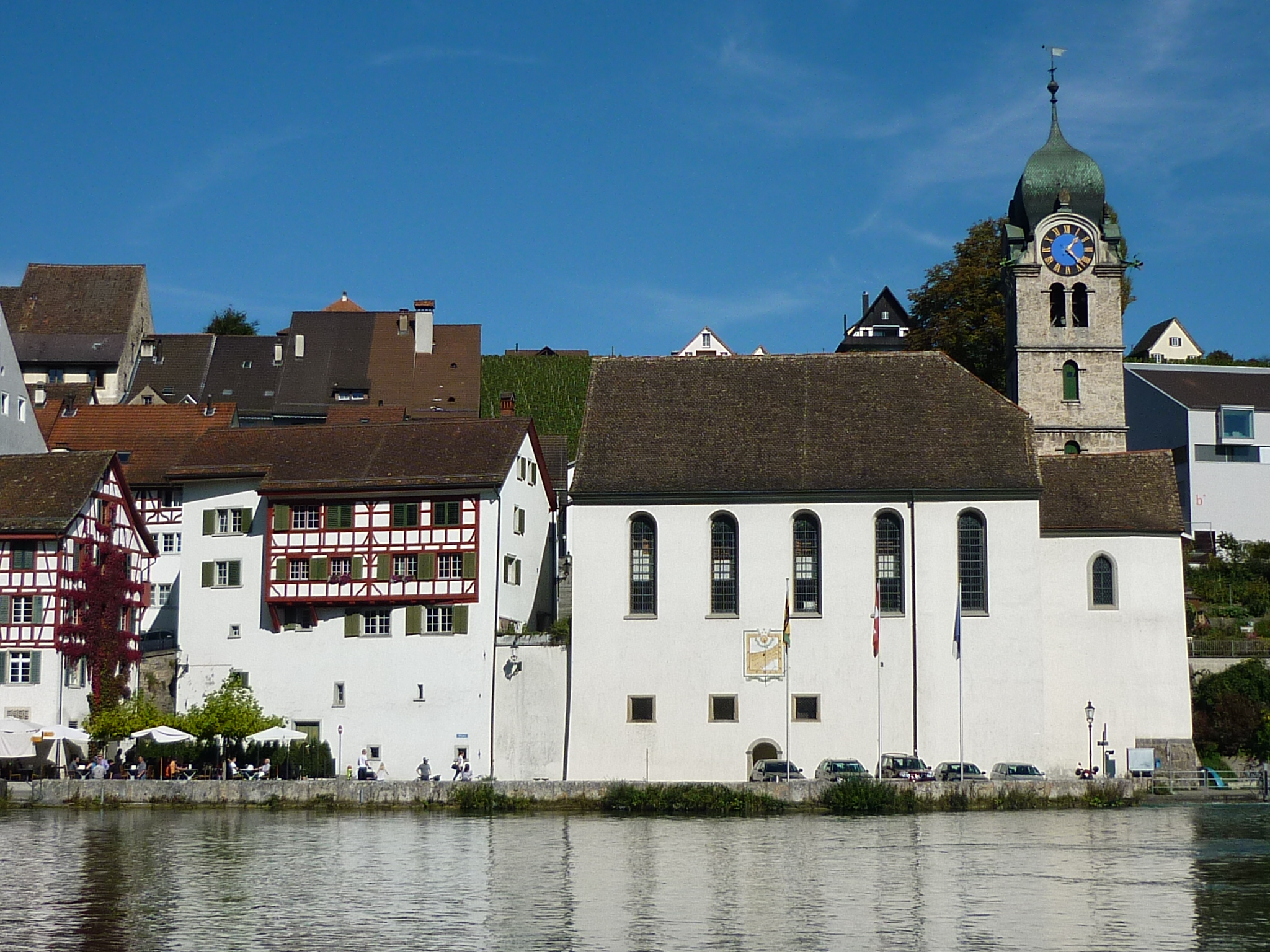 Reformierte Kirche, Eglisau ZH, Schweiz